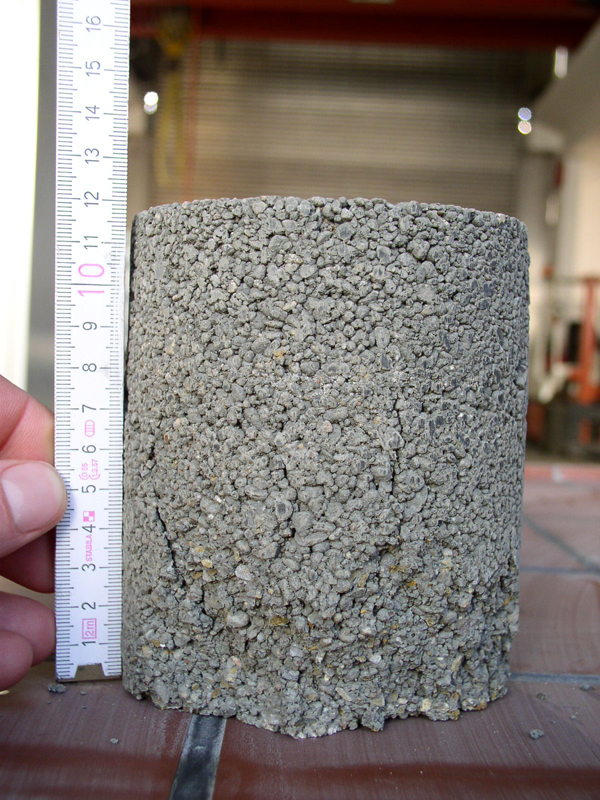 Proctorkörper nach der Druckfestigkeitsprüfung. Der Mörtel wurde mit einem Wasserfeststoffwert von 0,064 hergestellt (entspricht 1,6 l Wasser/25 kg Trockenmörtel).